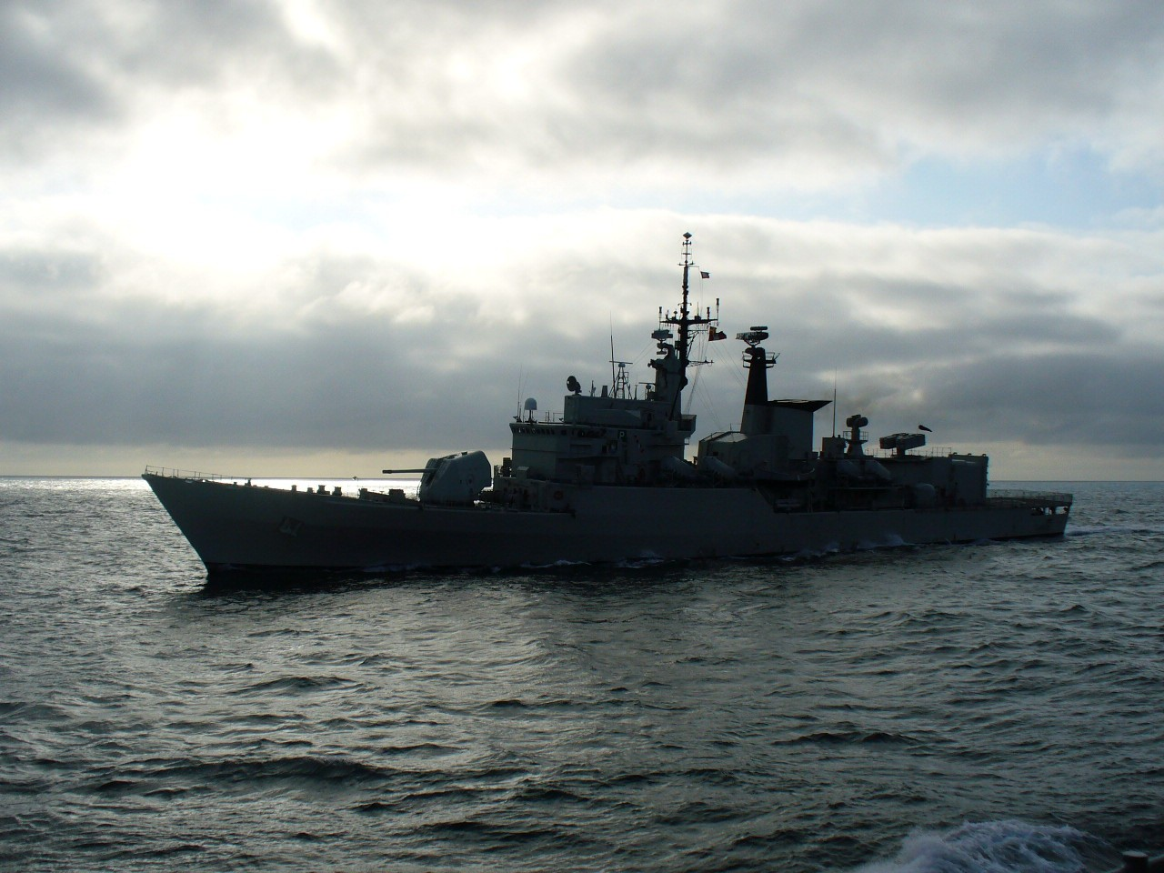 Peruvian frigate Coronel Bolognesi